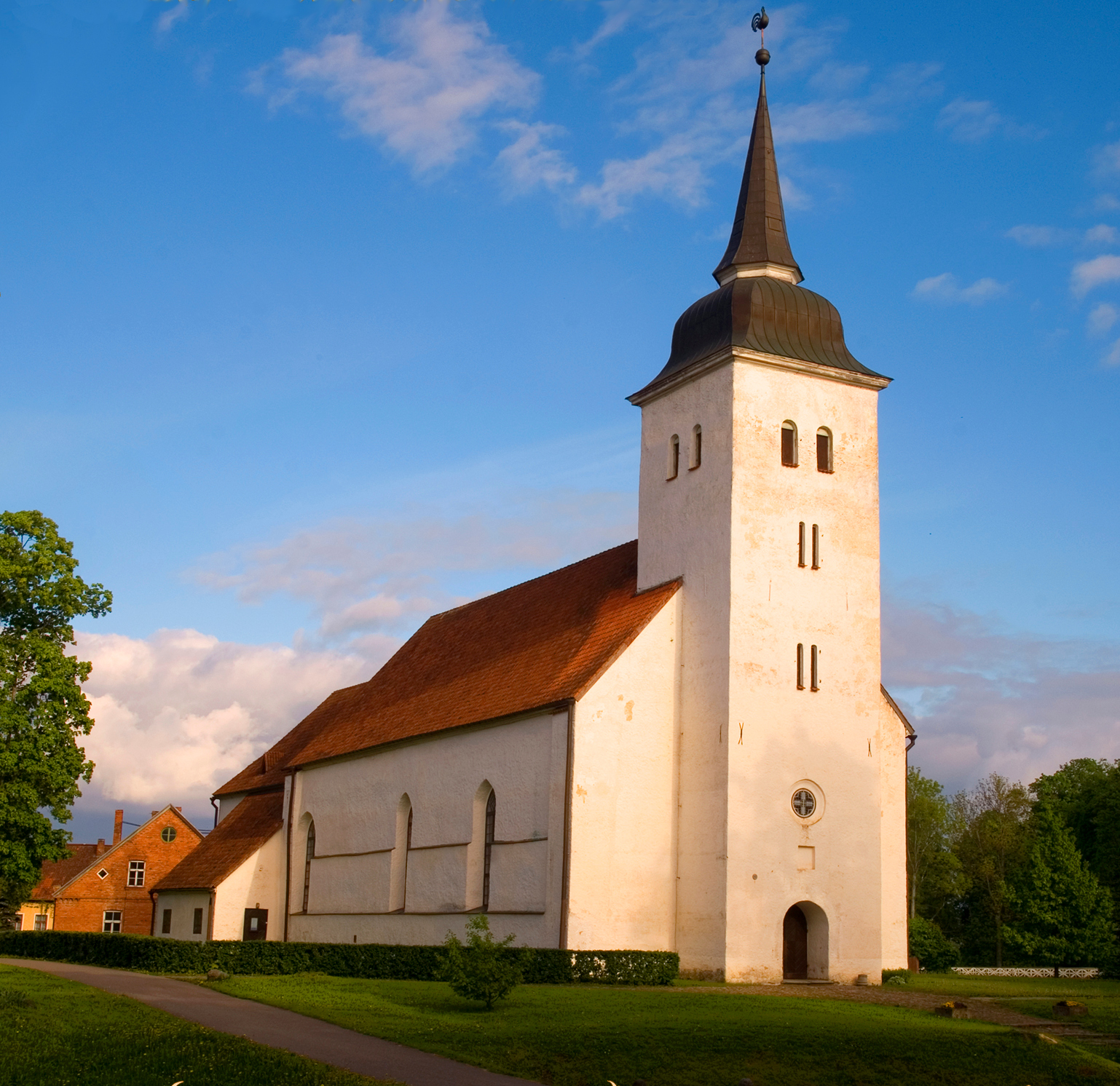 Viljandi Jaani kirik, ehitatud frantsiskaanlaste kloostrikirikuks aastatel 1466- 1472. Klooster suleti Liivi sõja ajal ordumeistri poolt. Kirik on hiljem kannatanud sõdades. 1952. aastal kirik suleti Nõukogude võimu poolt. Kirik restaureeriti 1980.-ndatel ja taaspühitseti 1992. aastal.